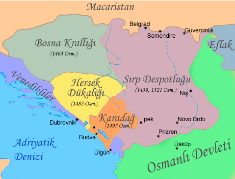 15. yüzyılda Sırbistan (Serbia in 15th century)